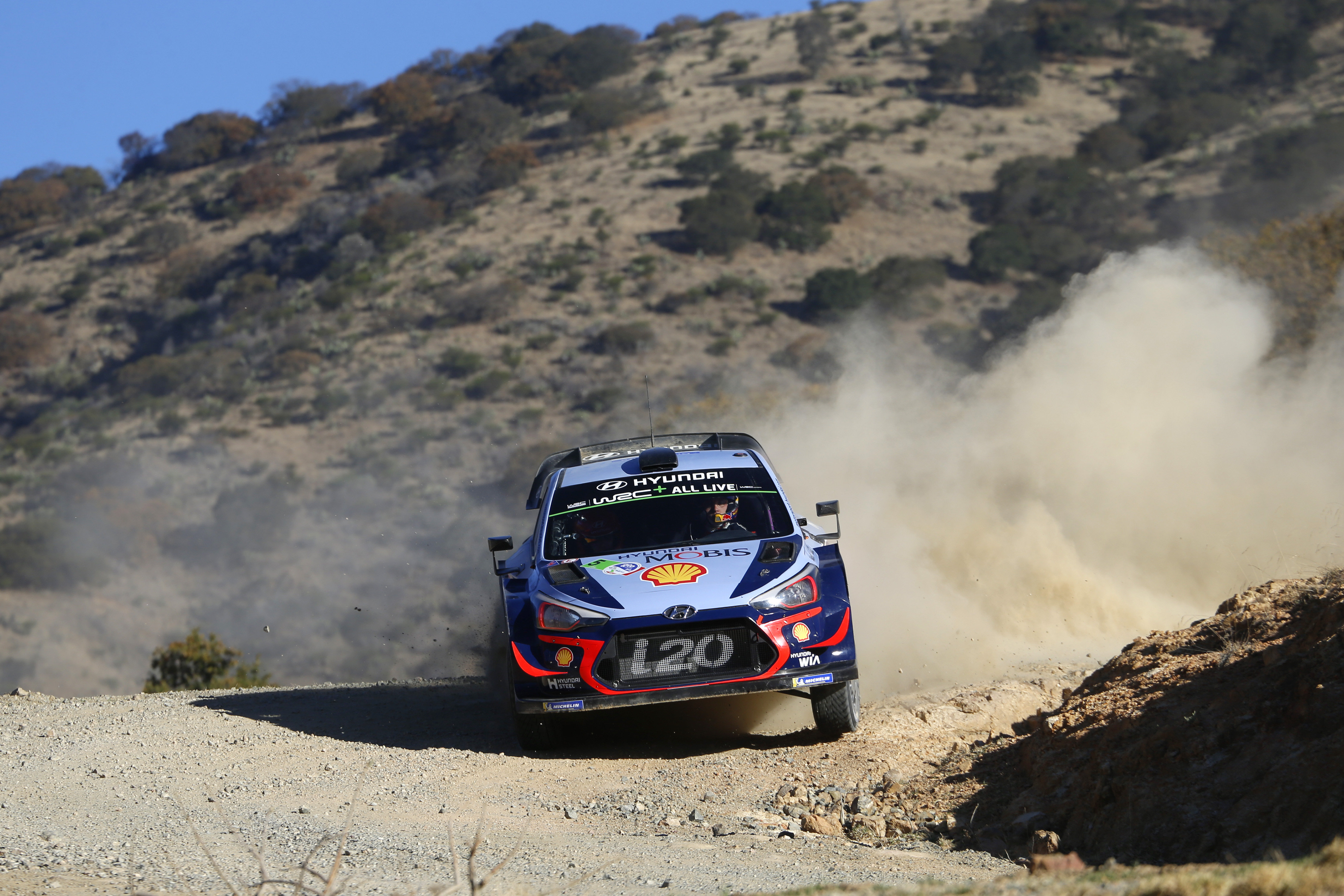 Thierry Neuville i Nicolas Gilsoul jadący Hyundaiem i20 Coupe WRC podczas Rajdu Meksyku 2018